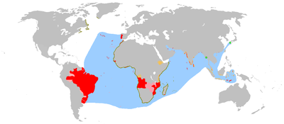 De / Later versions were uploaded by . - Lua error in Module:Fallback at line 139: No fallback page found for autotranslate (base=Template:Transferred from/i18n, lang=⧼lang⧽)., Dominio público